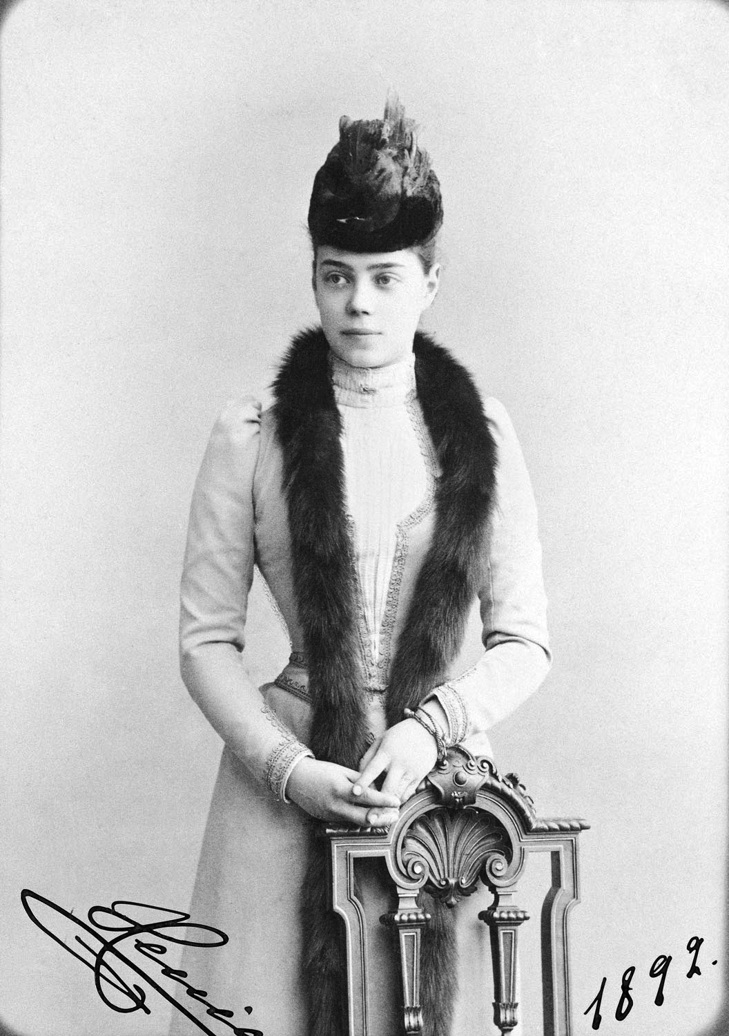 Grand Duchess Xenia Alexandrovna (1875-1960)